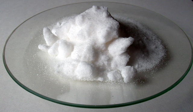 KNO3